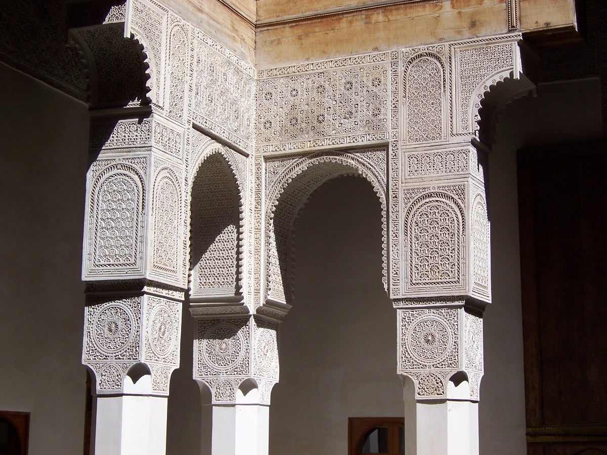 Fez, Morocco